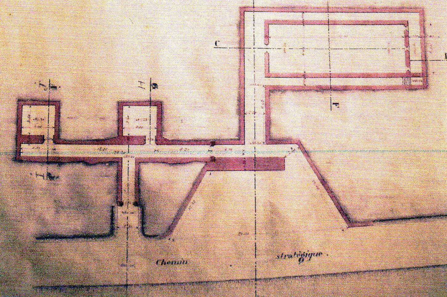 Locaux et couloirs du magasin